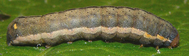 Trachea atriplicis larva - Czech Republic, Moravia, Olomouc - Bělidla